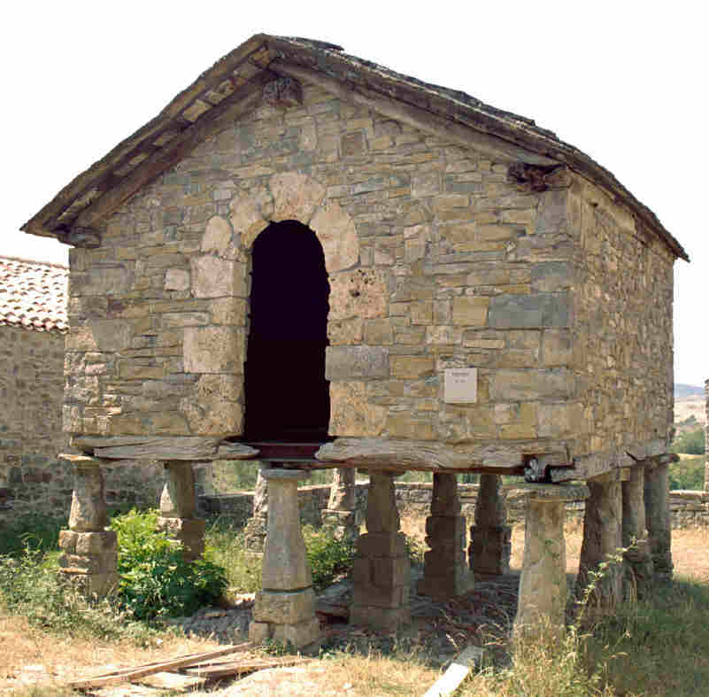 Hórreo del Monasterio de Santa Fe en la provincia de Navarra, (España). Tomada por JMSE el 9 de julio de 2003 y cedida a Wikipedia. Categoría: España (imagen) Categoría: Monumentos (imagen)